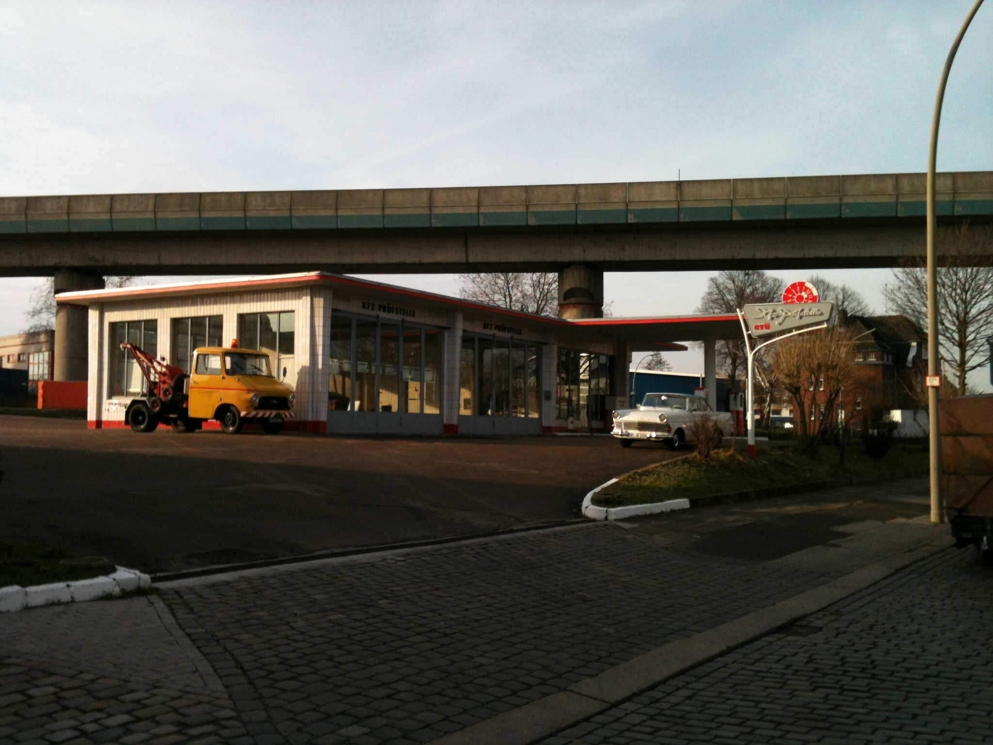 Gasolin-Tankstelle, HH-Rothenburgsort, Billhorner Röhrendamm 4